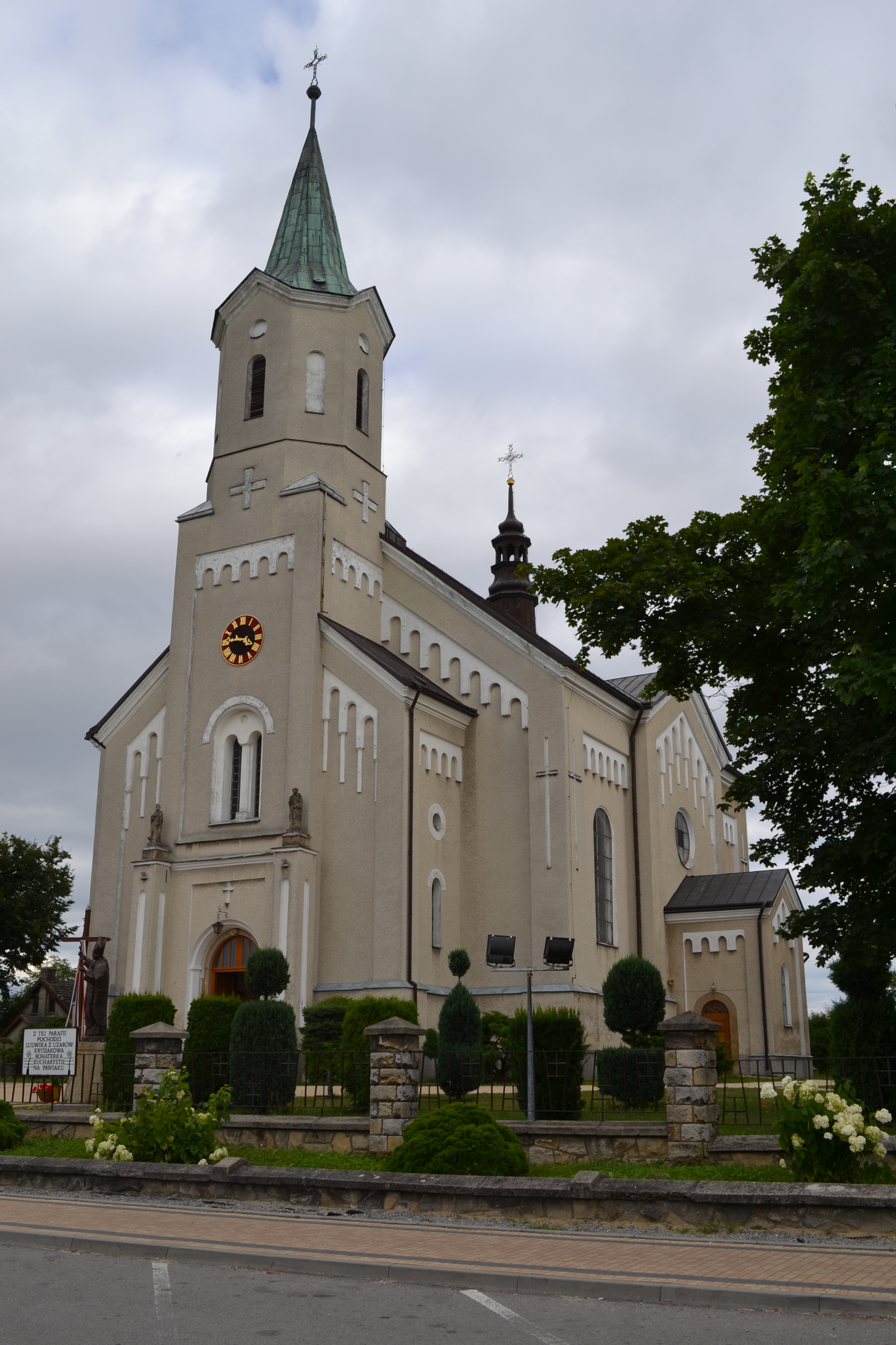 Padew Narodowa, kościół p.w. św. Bartłomieja Apostoła, 1878-86